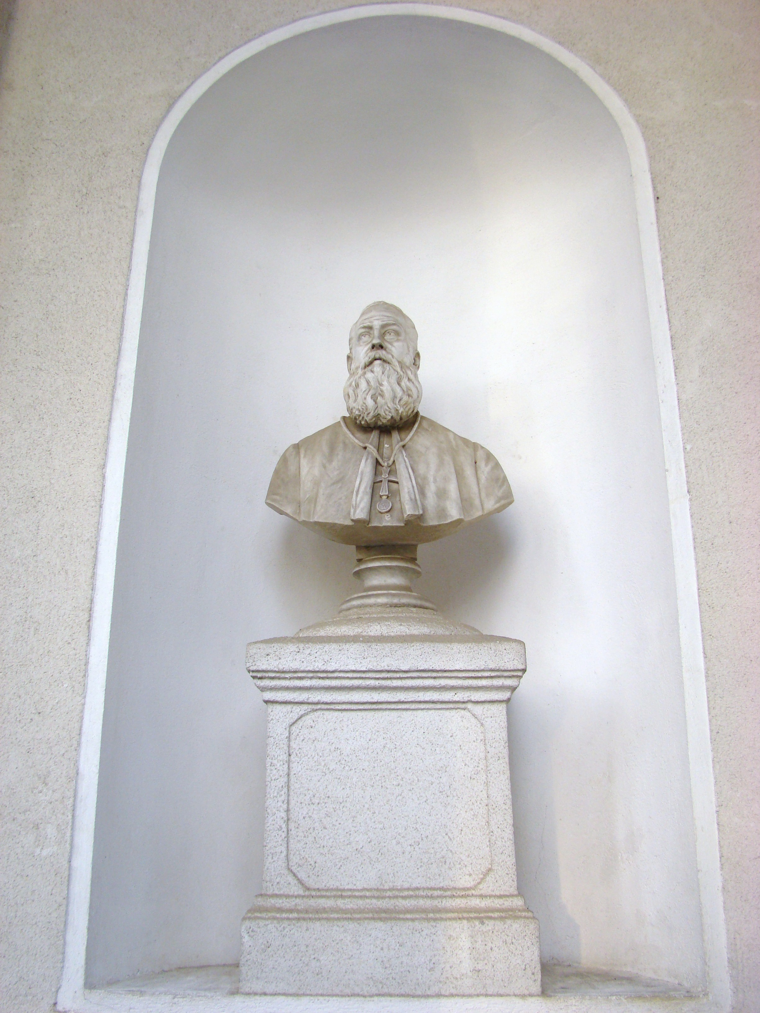 Biserica Unirii Tuturor Românilor "Adormirea Maicii Domnului", sat Șișești; comuna Șișești, județul Maramureș 01